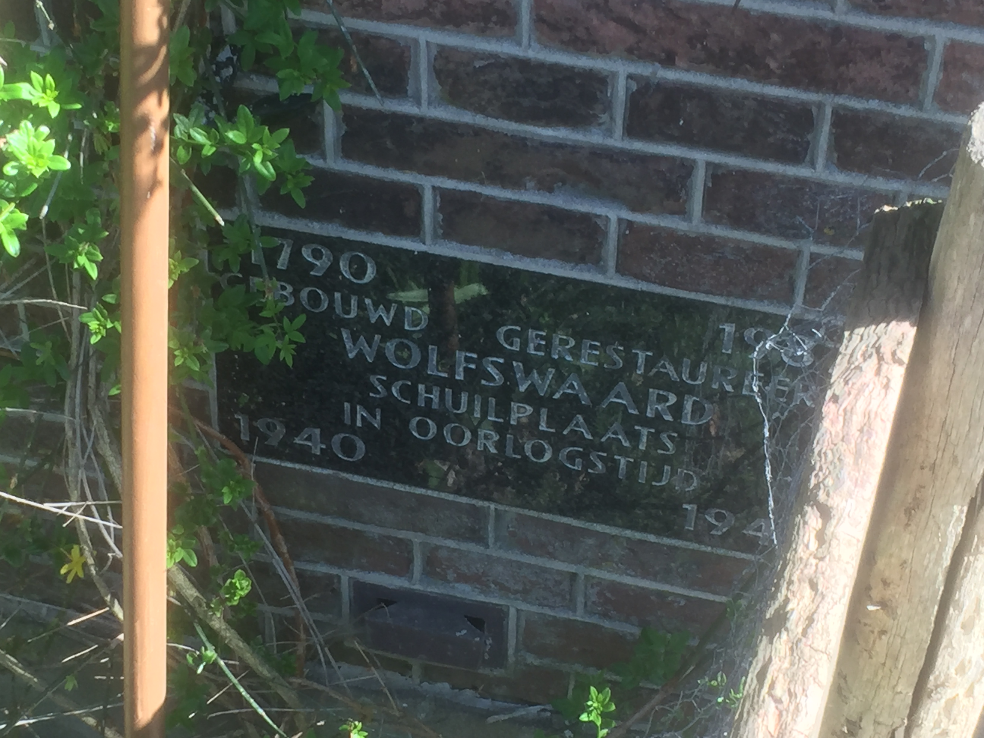 De gedenksteen bij de Wolfswaard. De steen werd in 1987 gelegd. De volledige tekst luidt: 1790 gebouwd 1987 gerestaureerd Wolfswaard. Schuilplaats in oorlogstijd 1940 1945